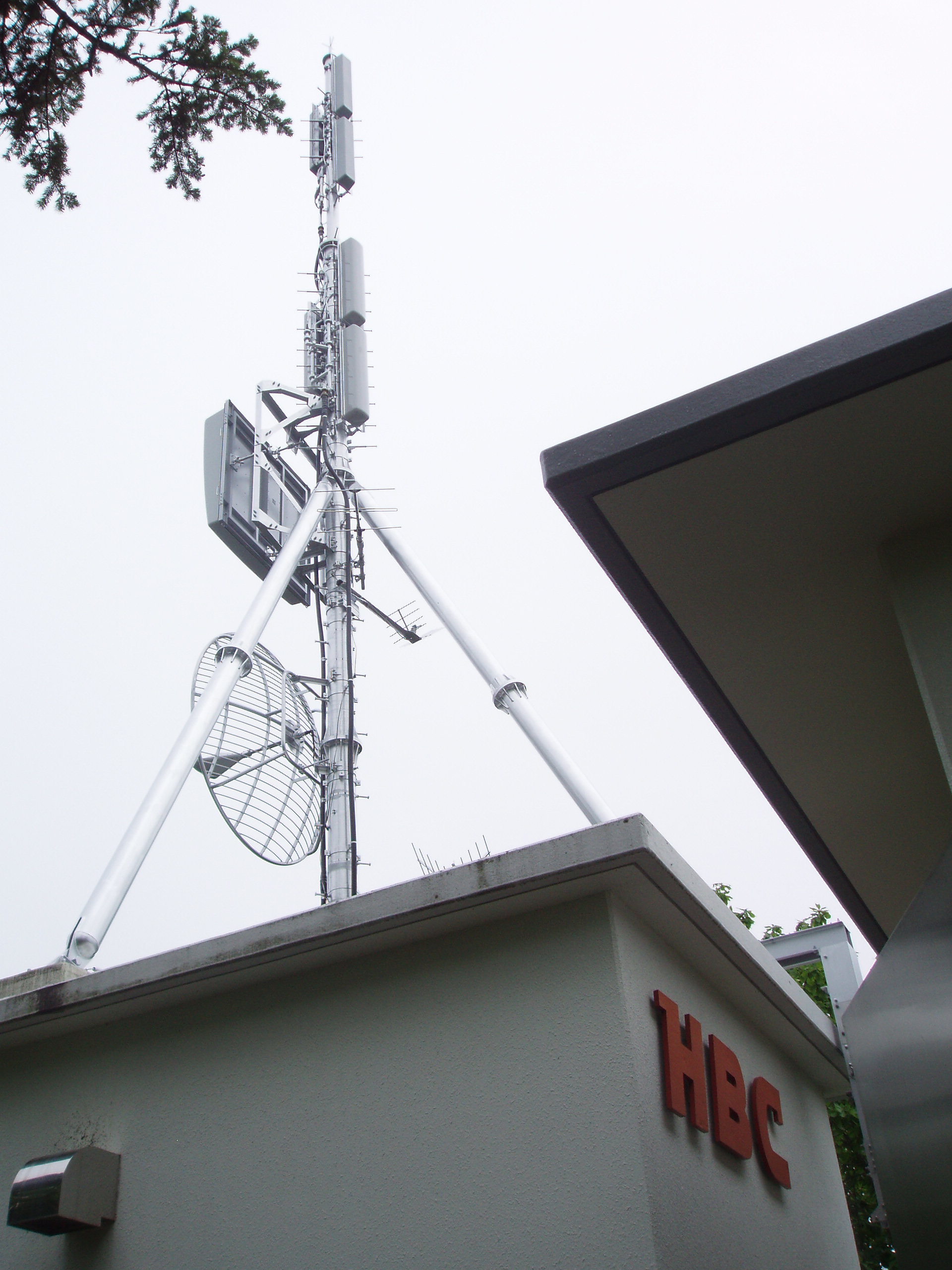 北見中継局（HBC） 民放四社のデジタル送信アンテナを併設